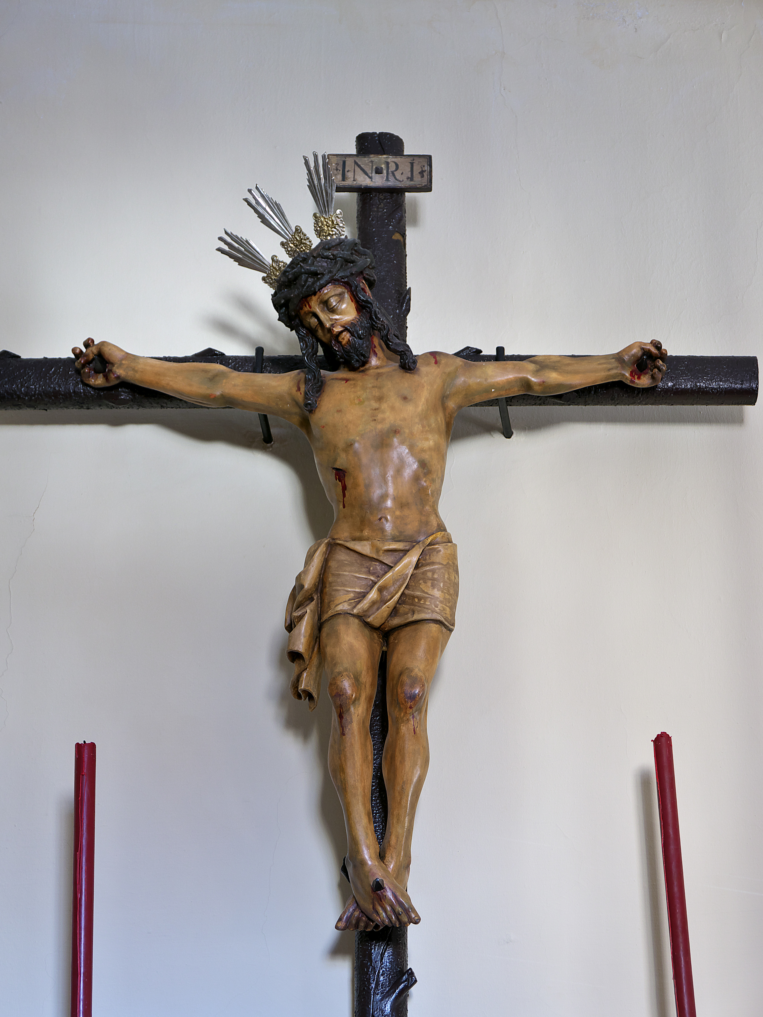 Talla de crucificado en la Iglesia de San Pedro, Huelva.